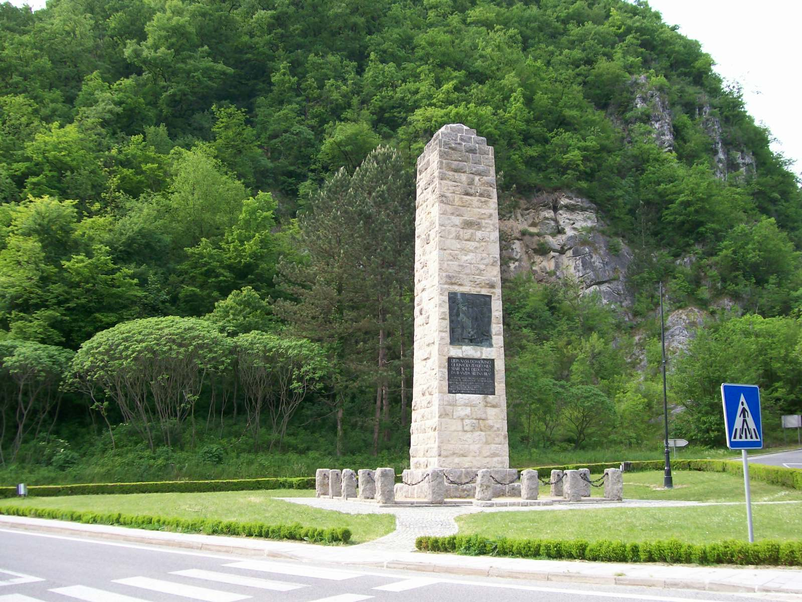 Spomenik hrvatskoj himni "Lijepa naša" u Zelenjaku na cesti Klanjec-Kumrovec. Spomenik je otkriven 24. studenog 1935., a dala ga je podići Družba braće hrvatskog zmaja